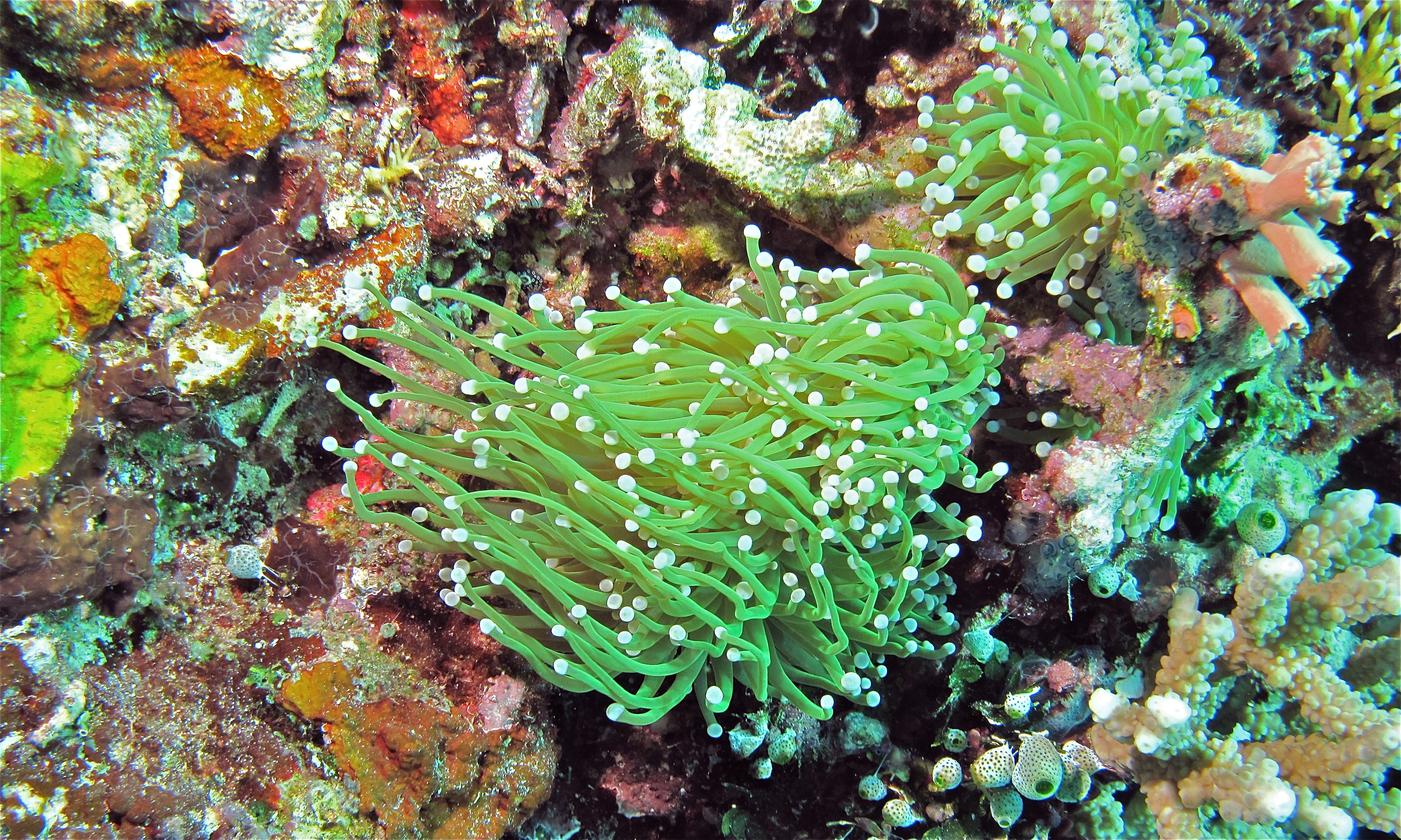 Negeri, Bunaken Island, Sulawesi, INDONESIA